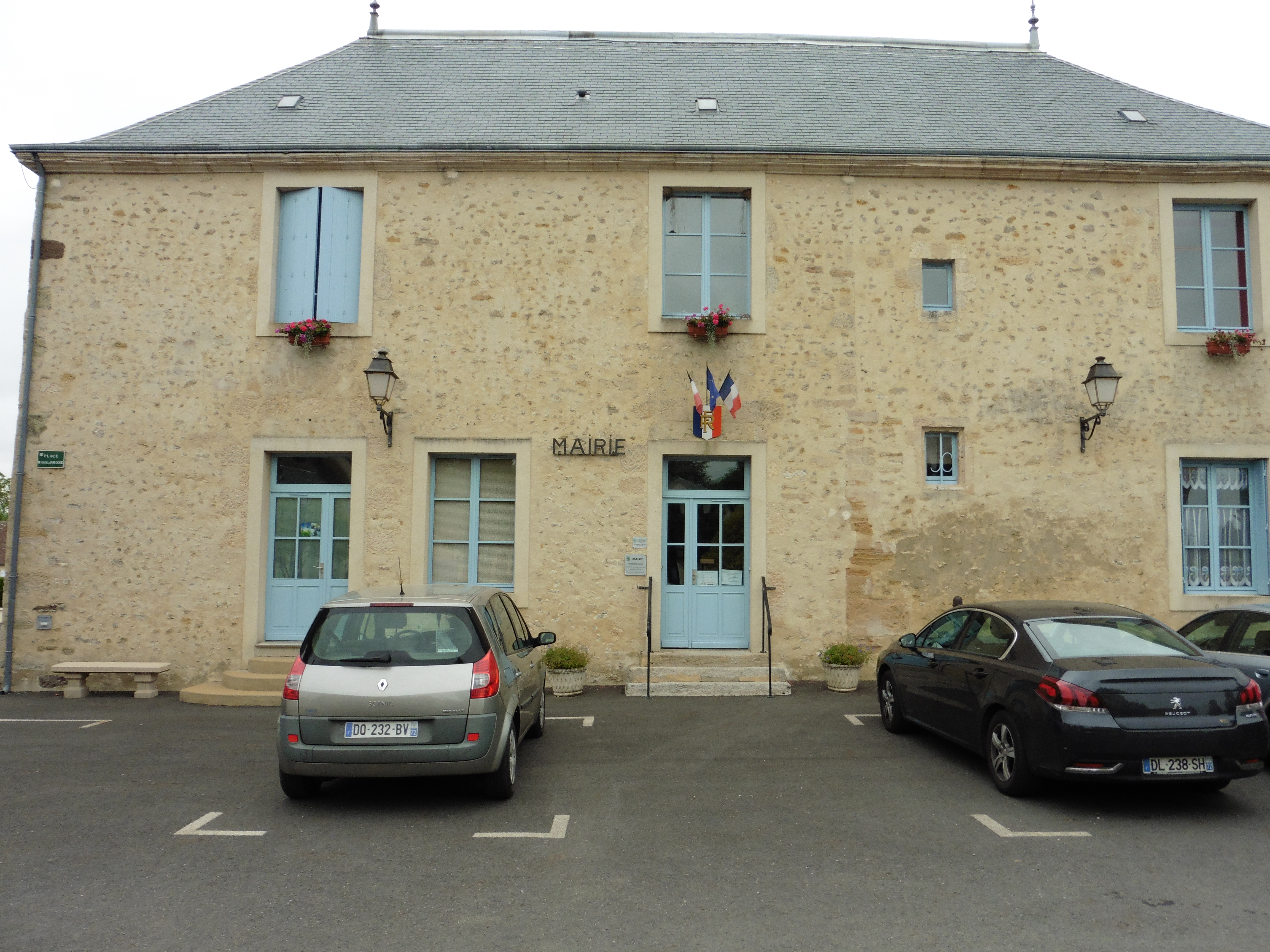 nouvelle vuemairie